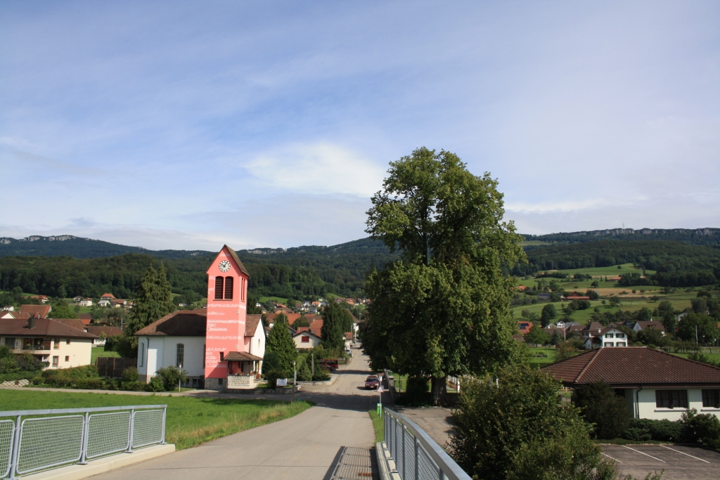 Attiswil